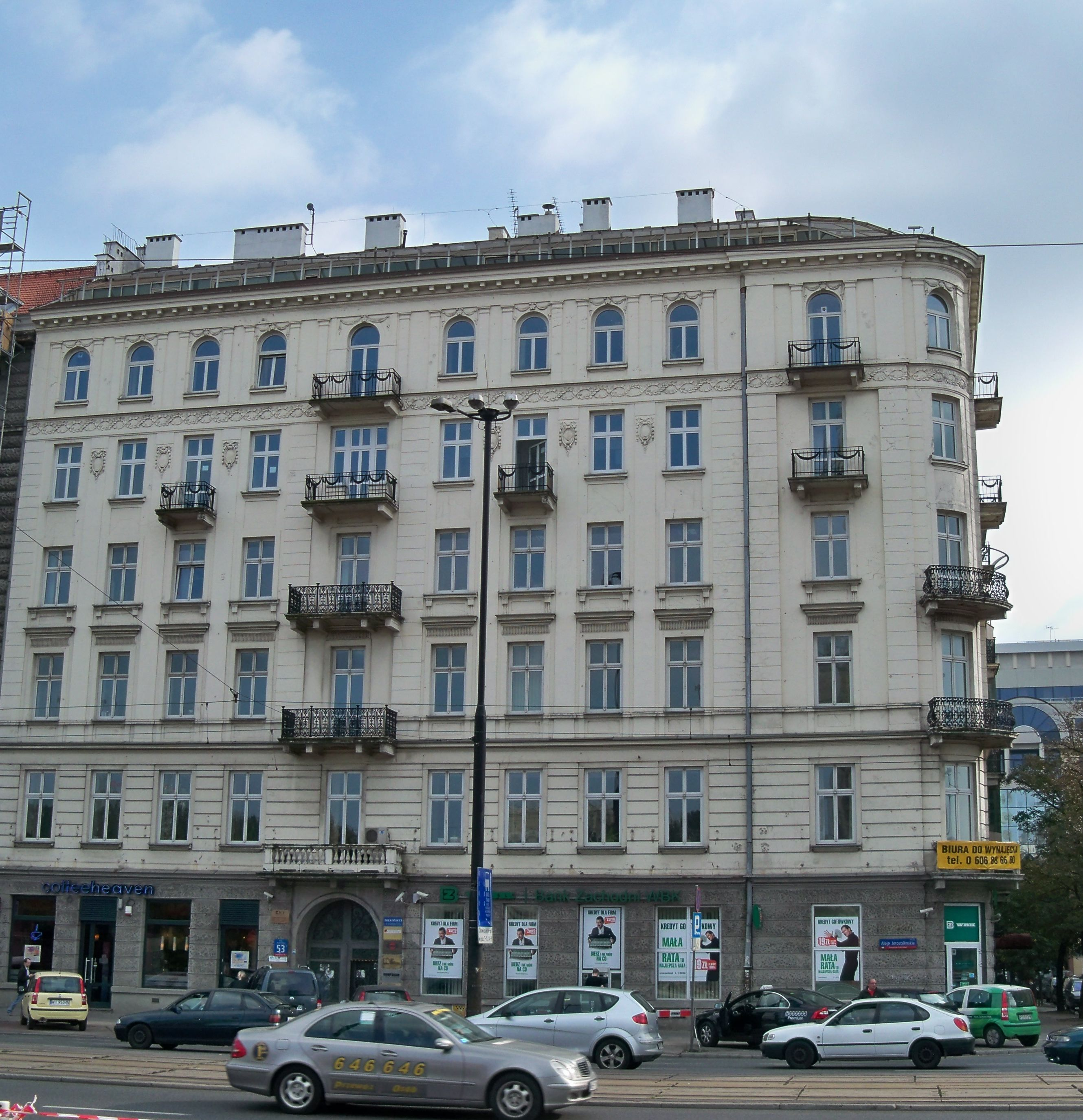 Kamienica Izaaka Rotberga (d. Hotel Central), Al. Jerozolimskie 53, róg Pankiewicza, Warszawa